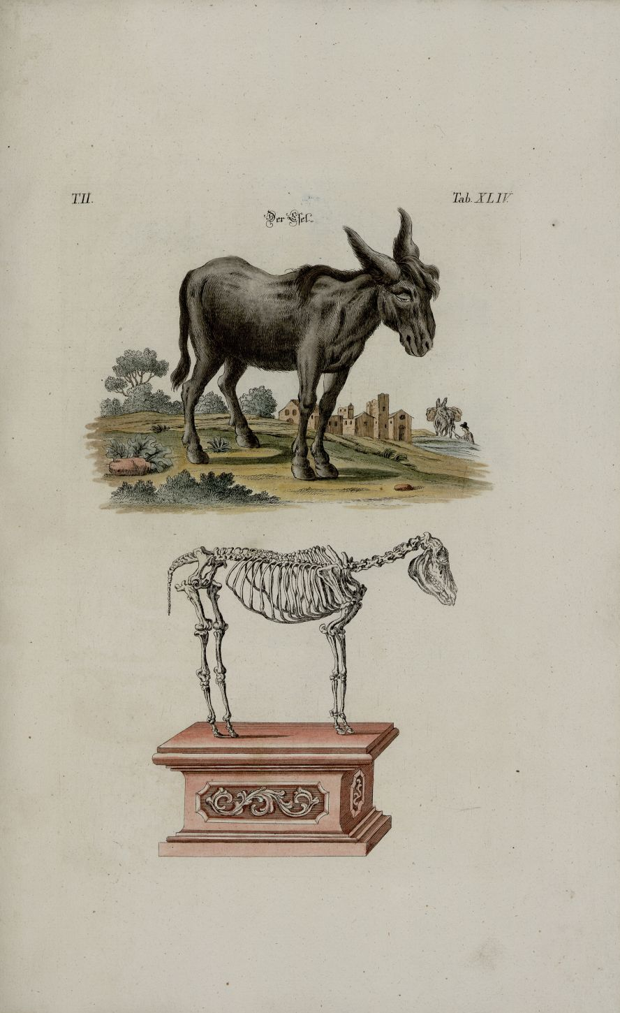 Angenehmer und nützlicher Zeit-Vertreib mit Betrachtung curioser Vorstellungen allerhand kriechender, fliegender und schwimmender, auf dem Land und im Wasser sich befindender und nährender Thiere, sowohl nach ihrer Gestalt und äusserlichen Beschaffenheit, als auch nach der accuratest davon verfertigten Structur ihrer Scelete oder Bein-Cörper, nebst einer deutlichen so physicalisch und anatomisch besonders aber osteologisch und mechanischen Beschreibung derselben / nach der Natur gezeichnet, gemahlet, in Kupfer gestochen und verlegt von Johann Daniel Meyer, Miniatur-Mahler in Nürnberg; Band 2; Nürnberg 1752 Tafel 44 Esel